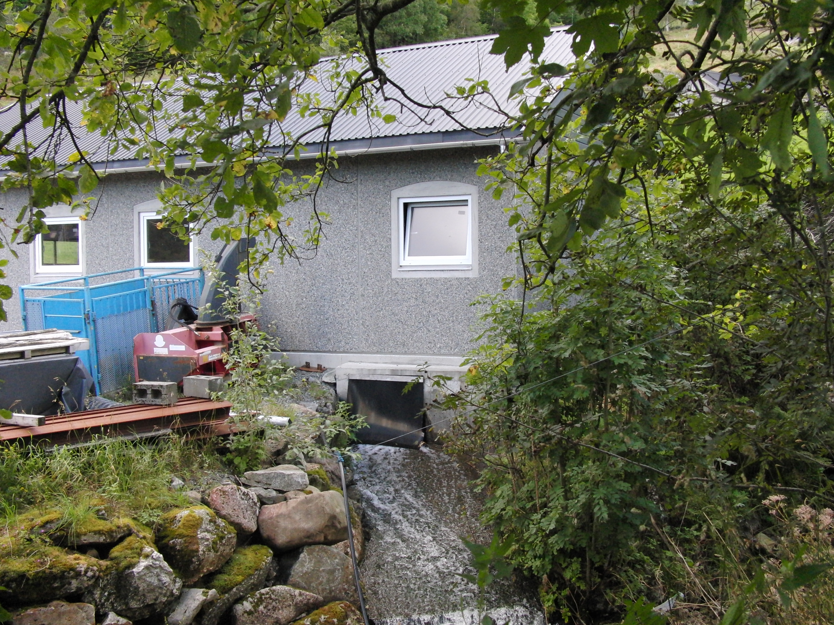 Havrevoll kraftverk